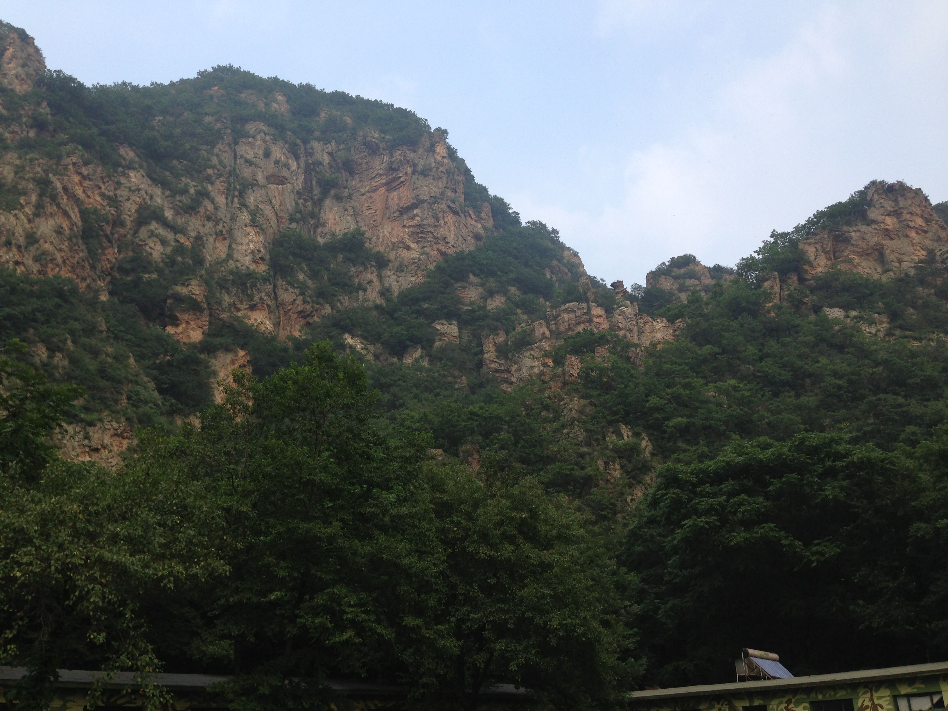 Zhuanghe, Dalian, Liaoning, China